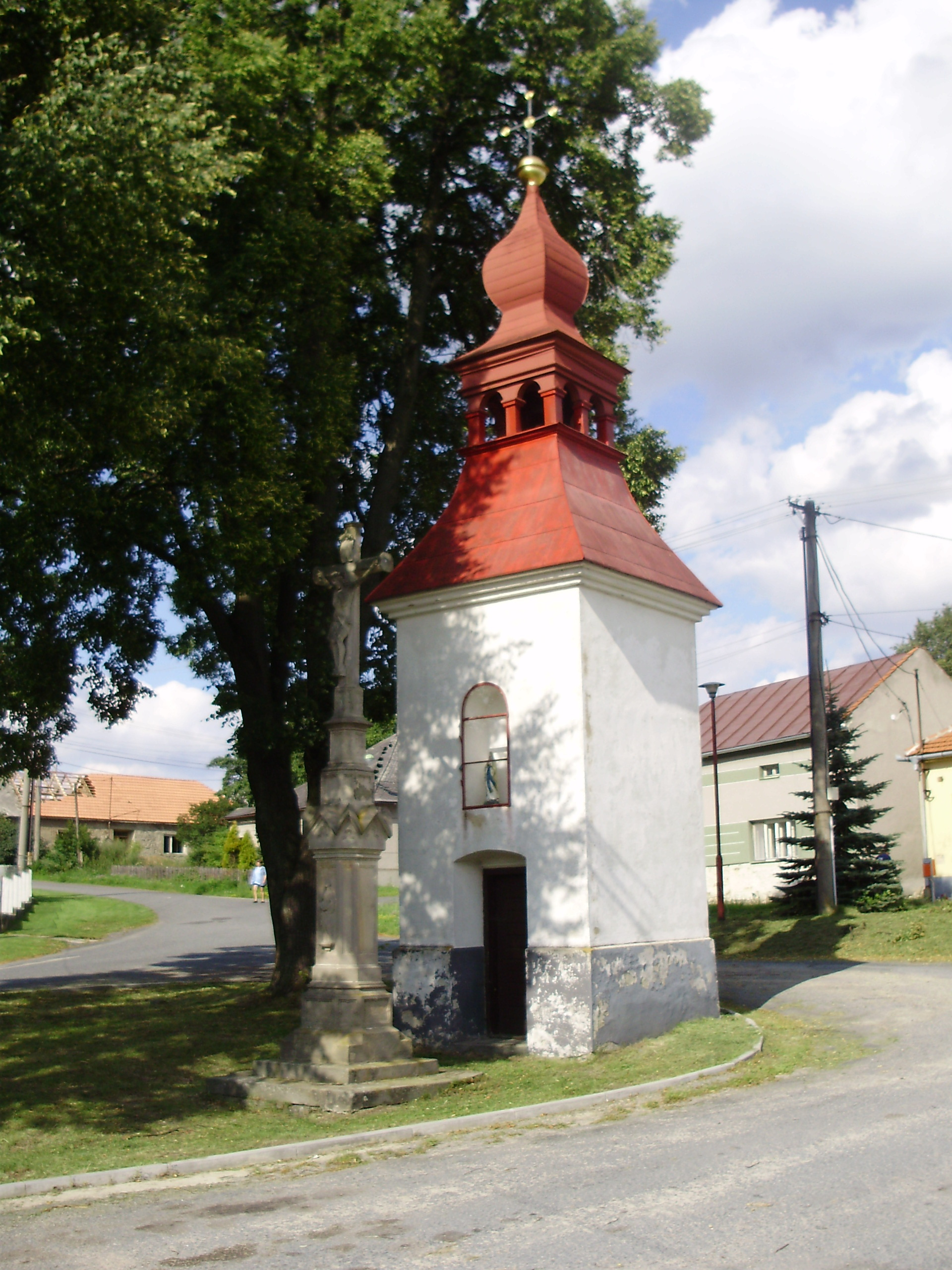 Náves s kapličkou Nové Sady(Vyškov- Czech republic)